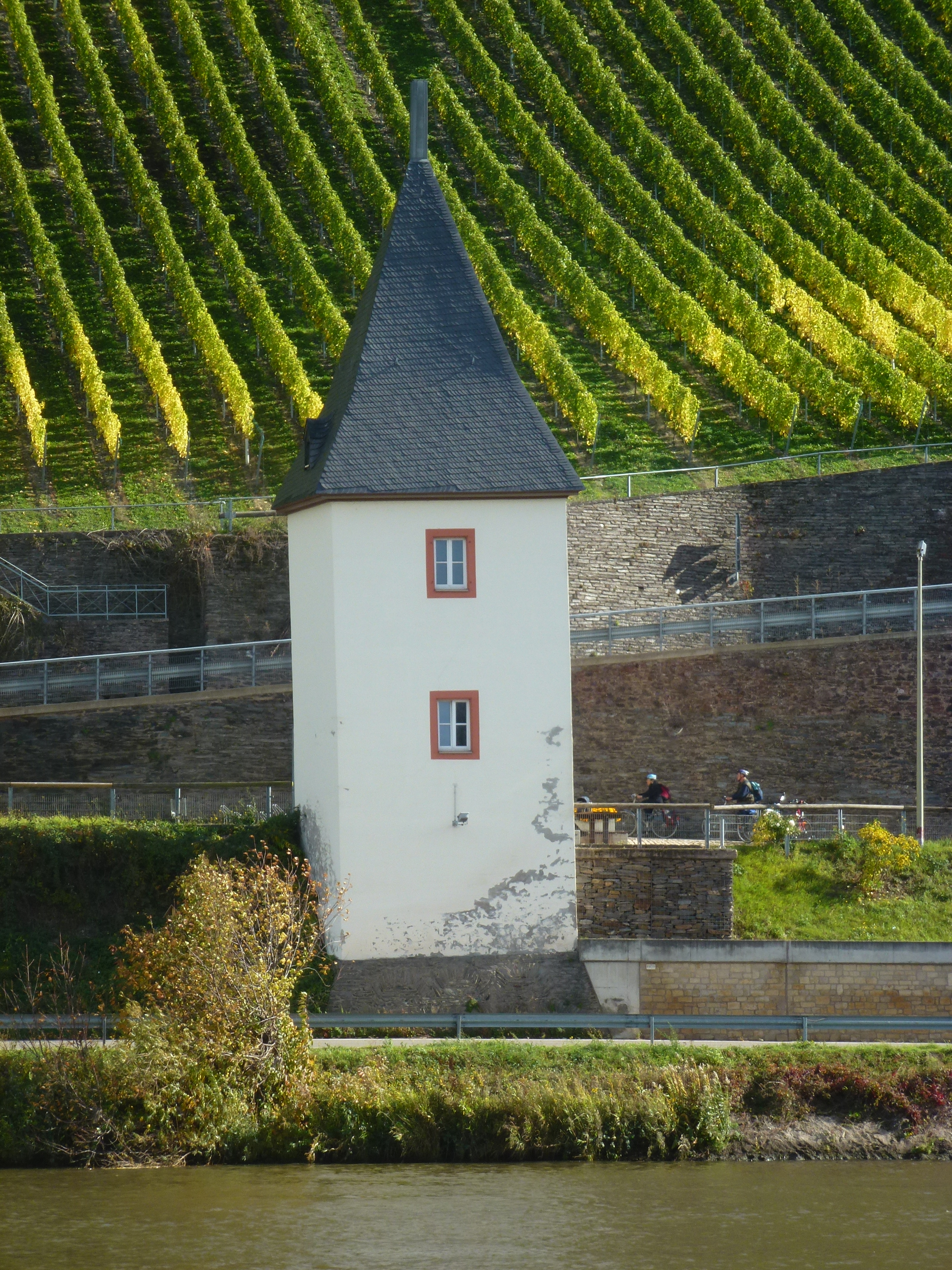 Ehemaliger Fährturm Trittenheim